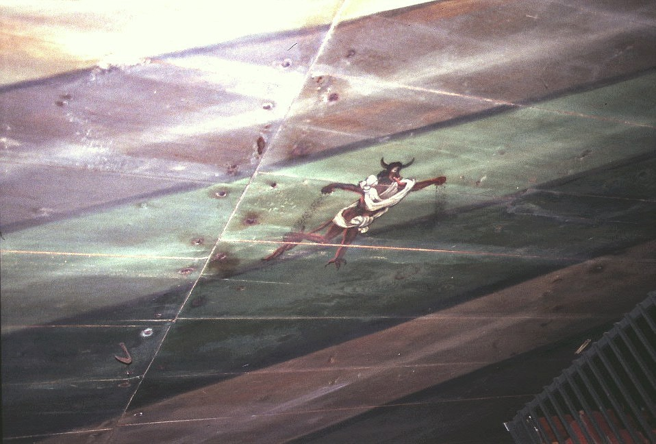 Enge Kirke i Sydslesvig. Loftmaleri